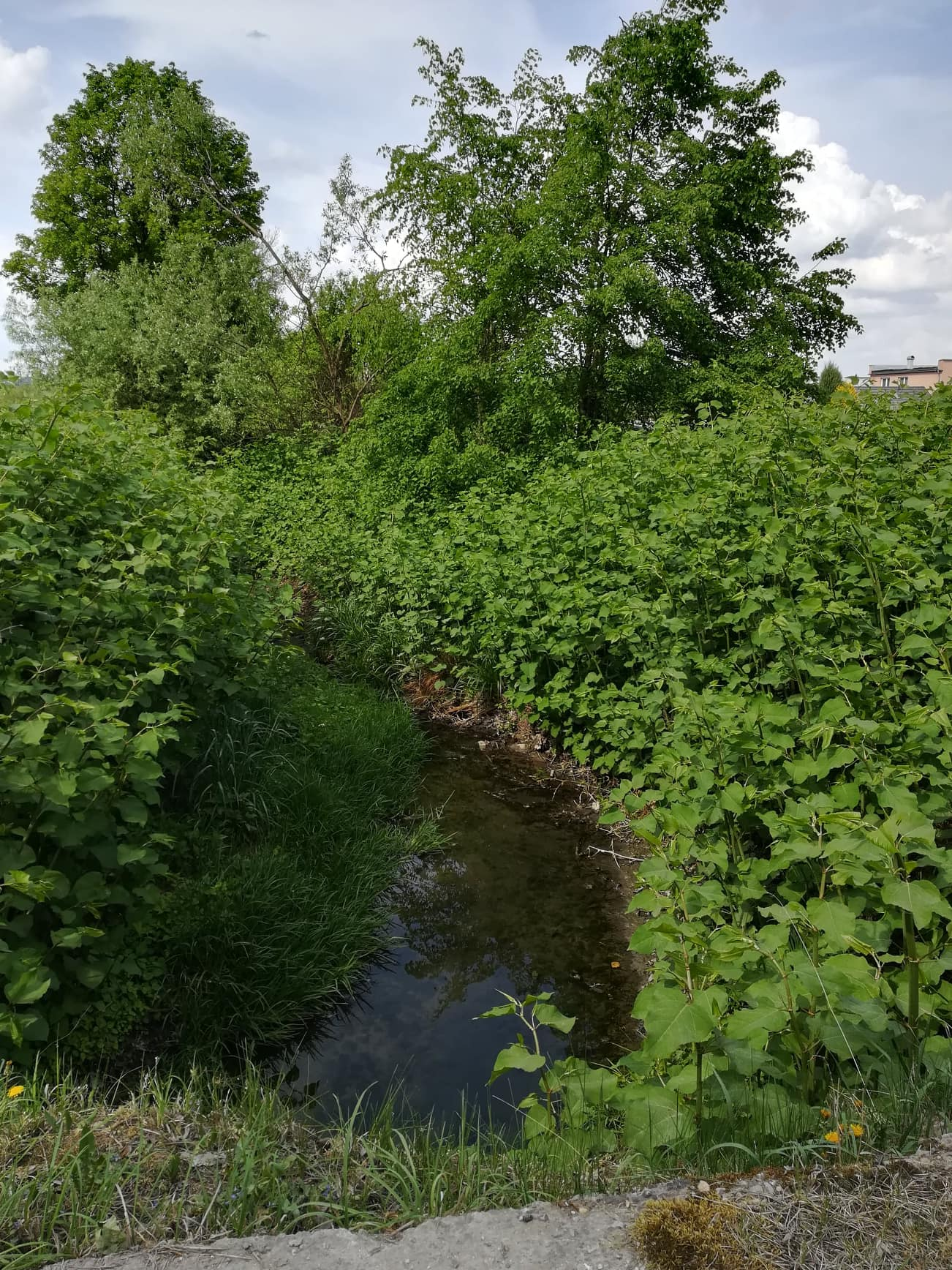 Potok Malá voda v Rosine